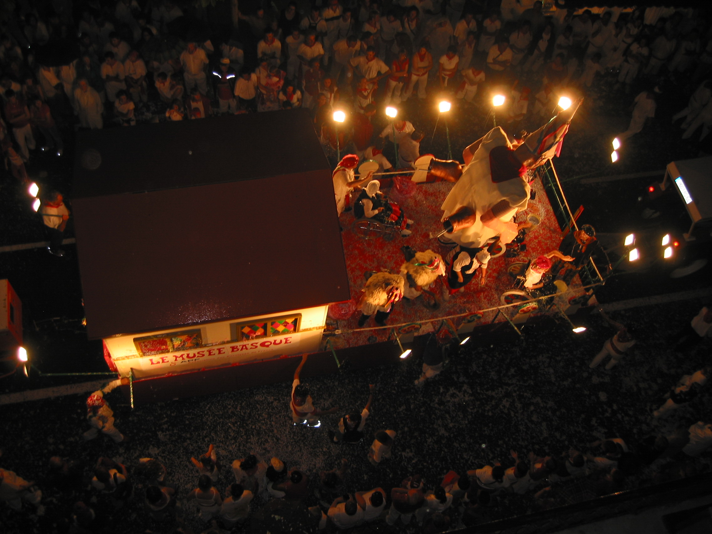 Fêtes de Bayonne 2004, le corso lumineux. Photo prise le 09/08/04 par Harrieta171